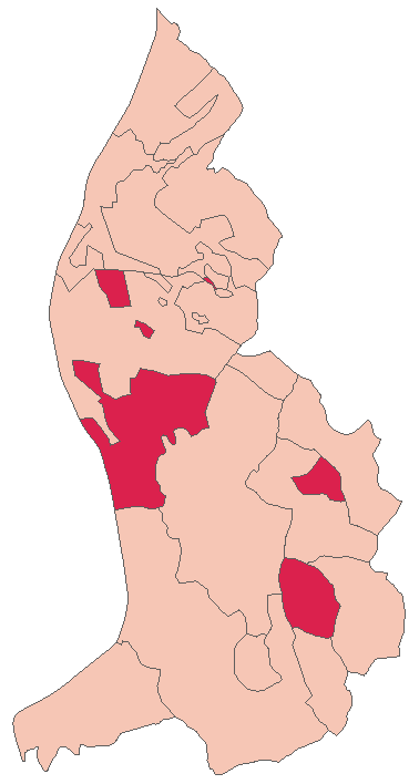 Municipalities of Liechtenstein: Vaduz